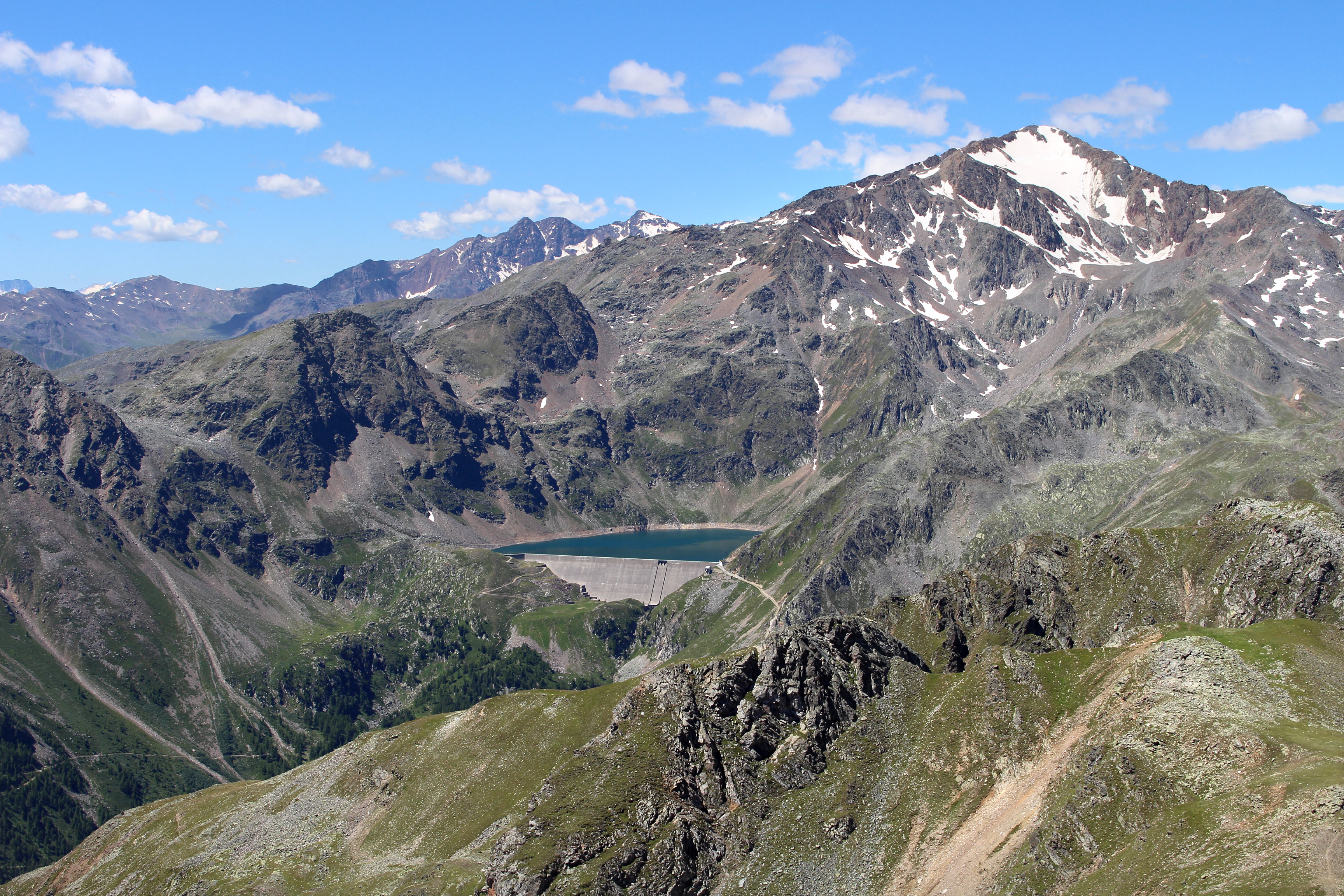 Blick zum Berg Hasenöhrl & Arzkarsee vom Gipfel des Hohen Diebes aus (2730 m.ü.M.). Der Hohe Dieb hat einen Doppelgipfel mit jeweils einem separaten Gipfelkreuz. Der Hohe Dieb liegt auf dem Rücken des Zufrittkamms. Der Zufrittkamm trennt das Südtiroler Vinschgau auf der einen Seite vom Ultental auf der anderen Seite.